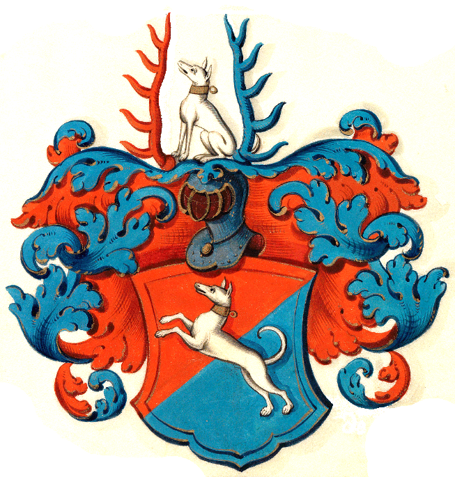 Wappen der Baldinger (Ulmer Patrizier)